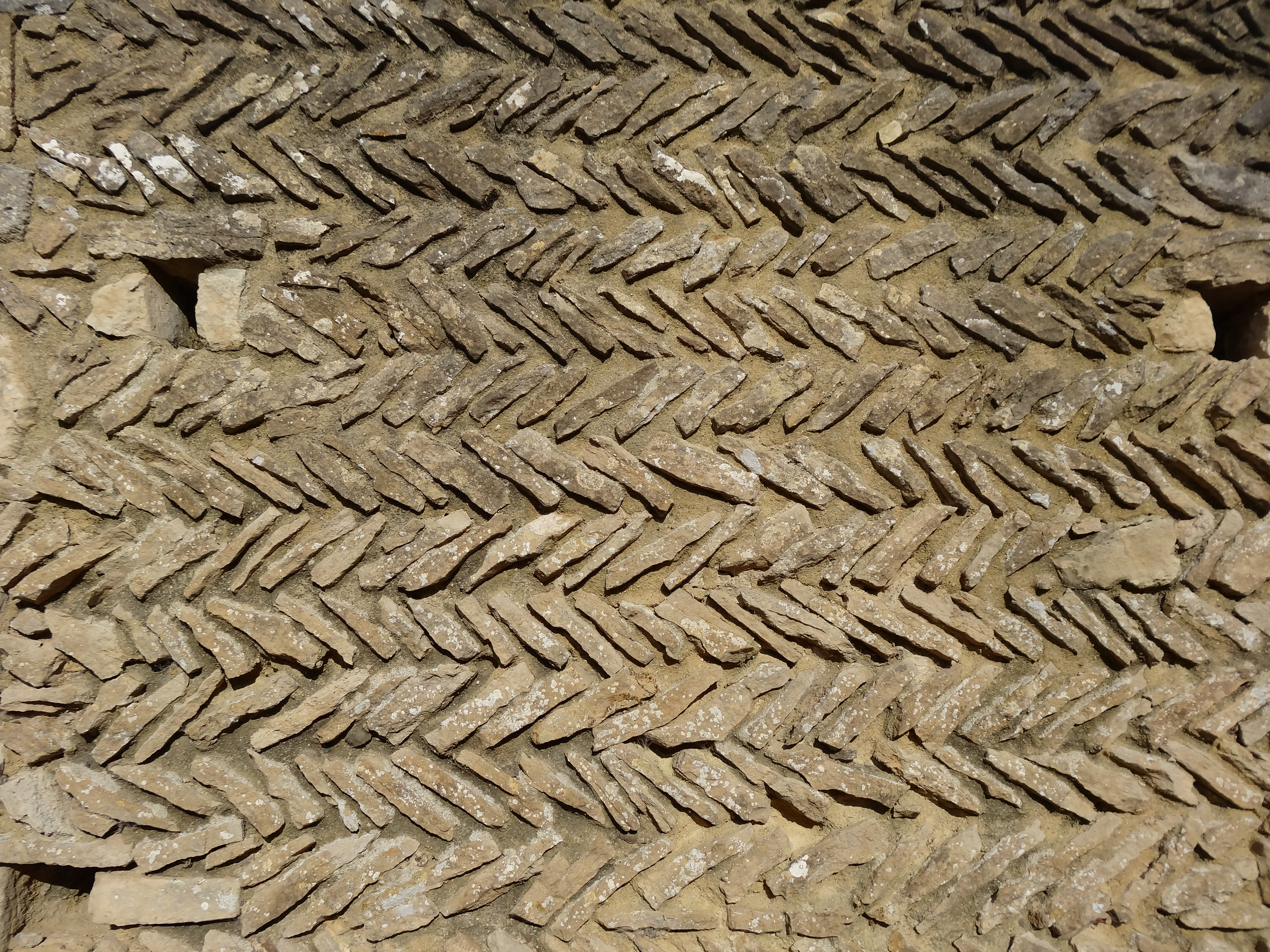 Périers-sur-le-Dan (Calvados) mur sud de la nef appareillé en arête-de-poisson en pierre calcaire de Caen